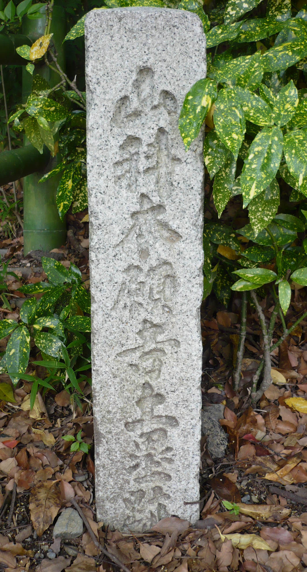 山科中央公園内にある土塁跡の標記